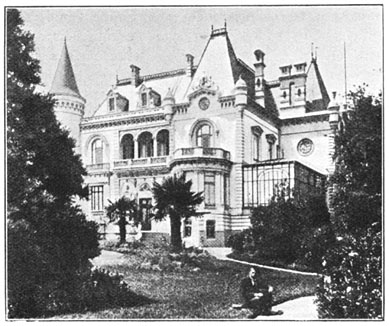 "Het paleis der familie Cousino te Lota"